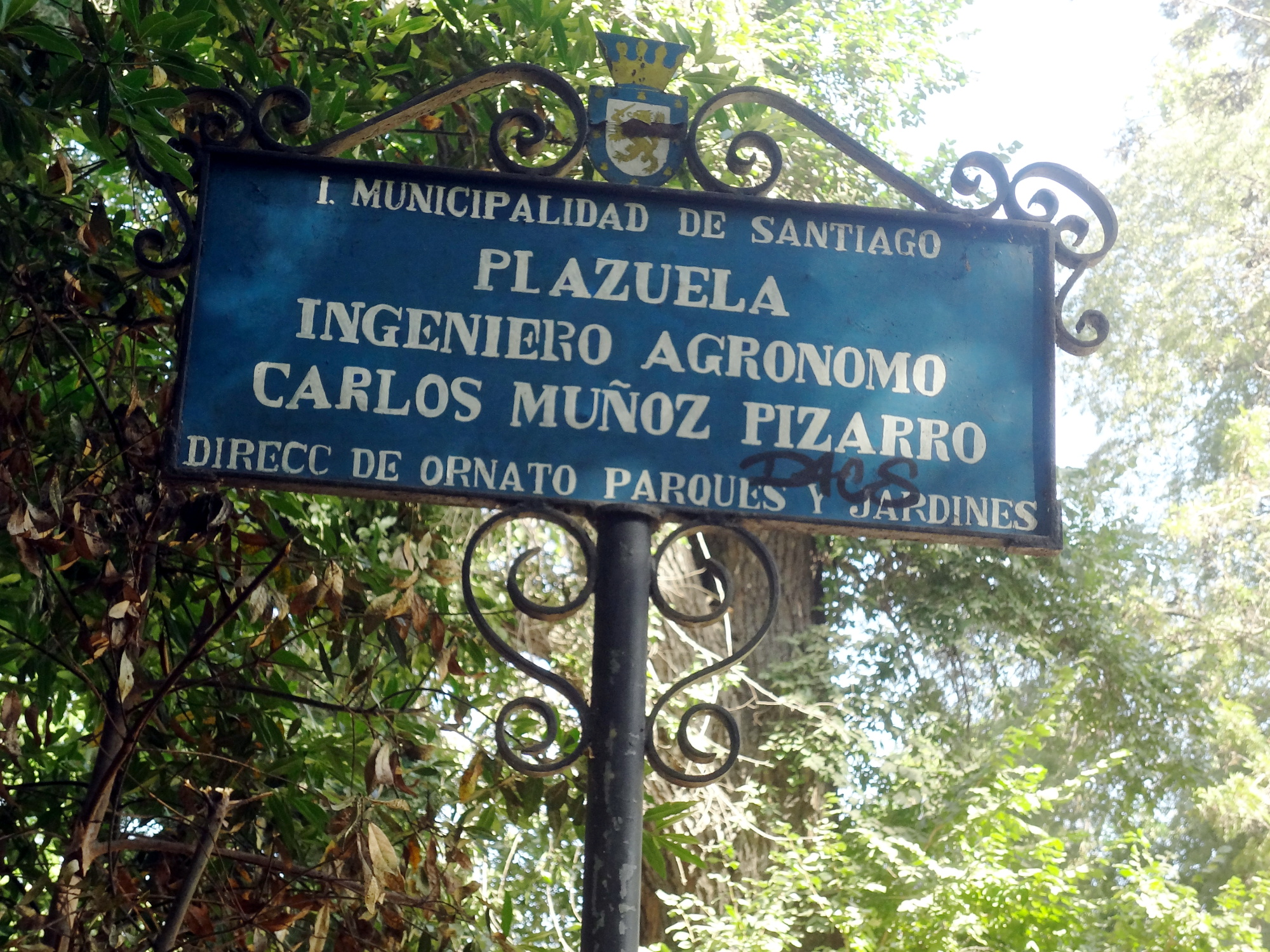 Plazuela Carlos Muñoz Pizarro en el Parque Quinta Normal, inaugurada en 1976 como homenaje al botánico.